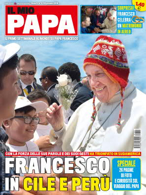 Copertina della rivista Il mio Papa 24 gennaio 2018, Arnoldo Mondadori Editore.